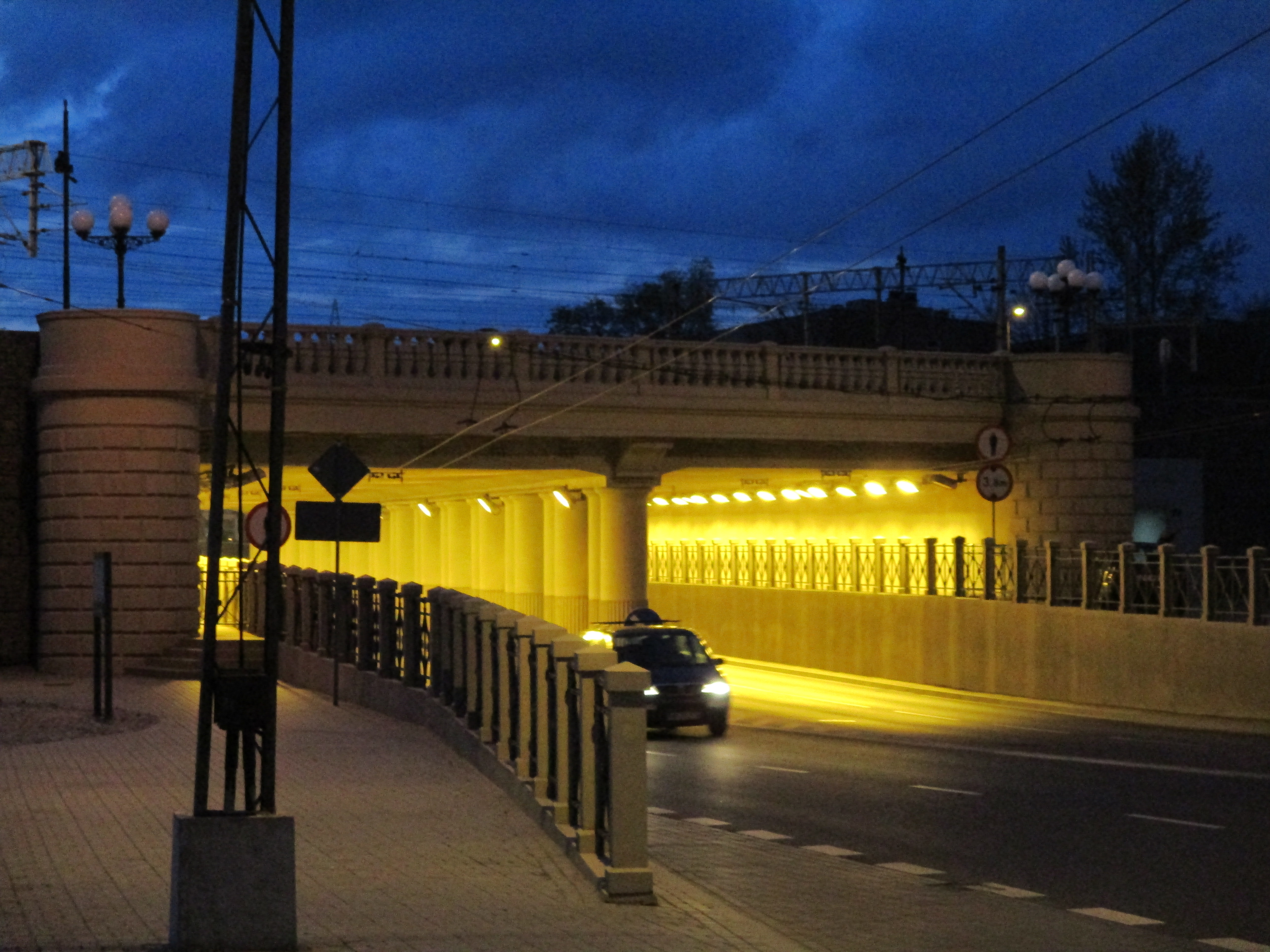 Wiadukt na ulicy Kunickiego pod magistralą kolejową nr 7